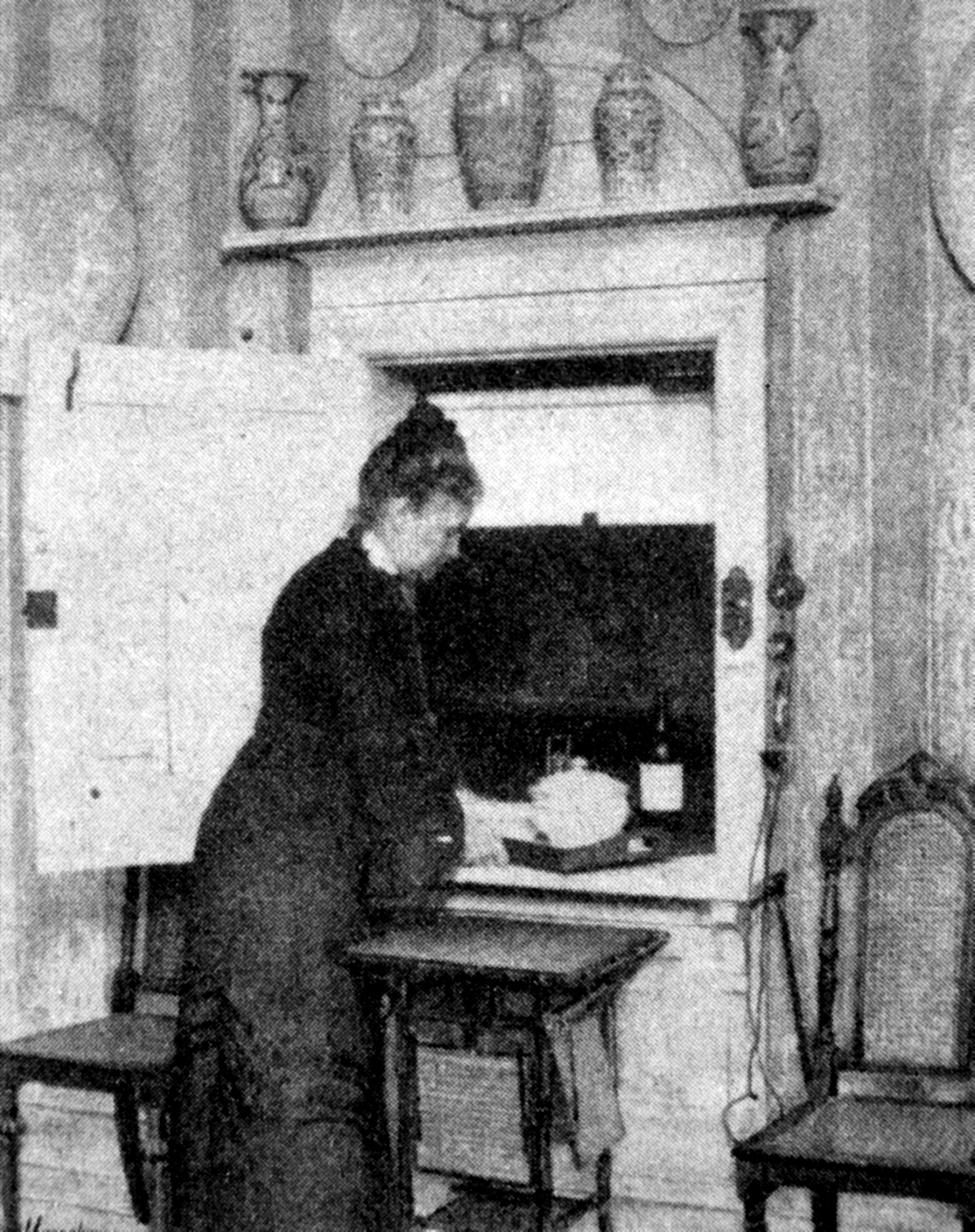 centralbyggnad kopenhagen - einküchenhaus